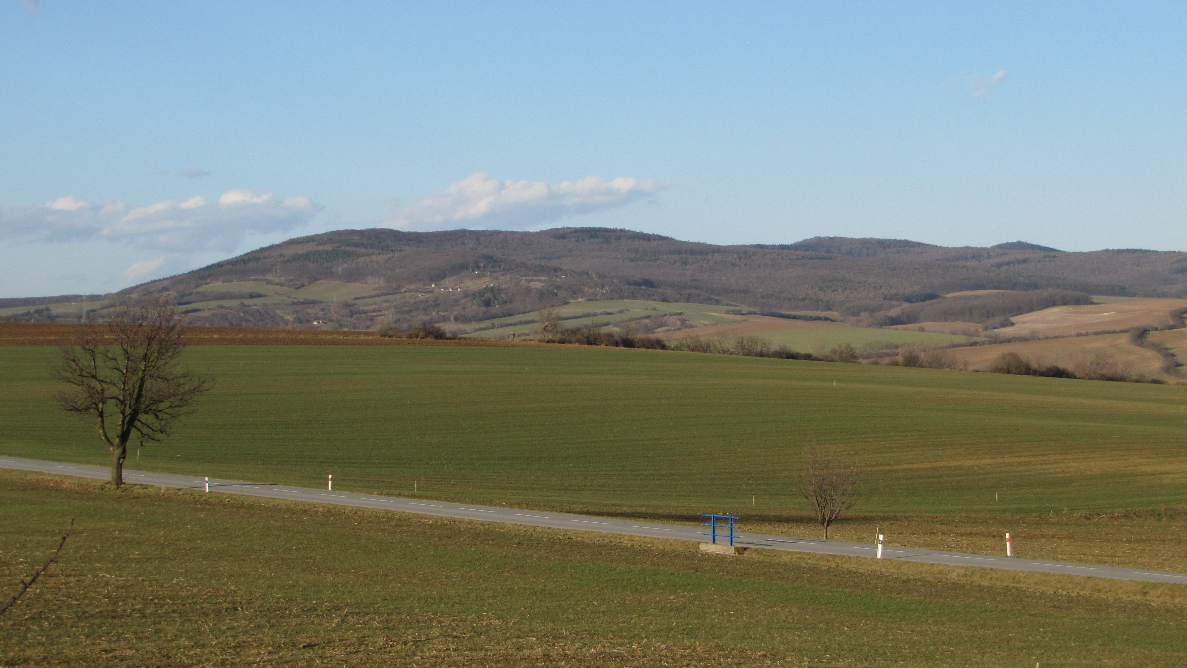 Lenivá Hora v Chřibech, nejvyšší bod na území města Kyjova (462,7 m n. m.), severně od centra města. Podhled od rozcestí "U Kohútka".